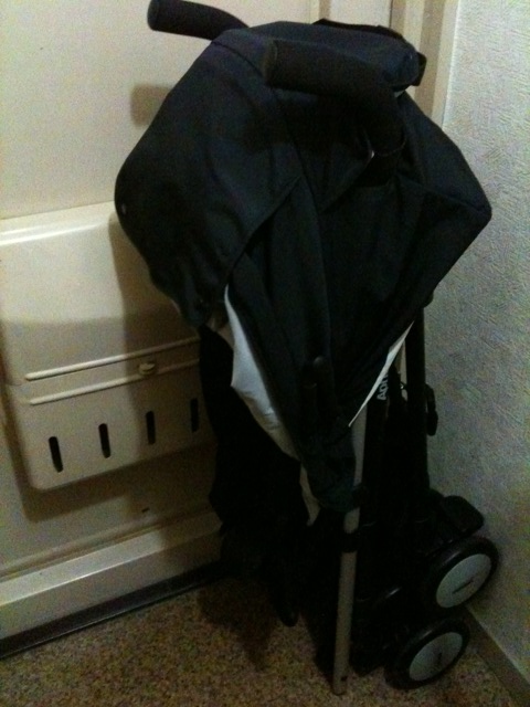 ベビーカー（アップリカ STICK flat）を買った！